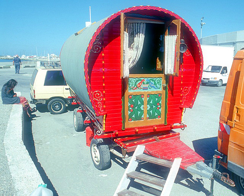 Ancienne verdine gitane aux Saintes-Maries-de-la-Mer